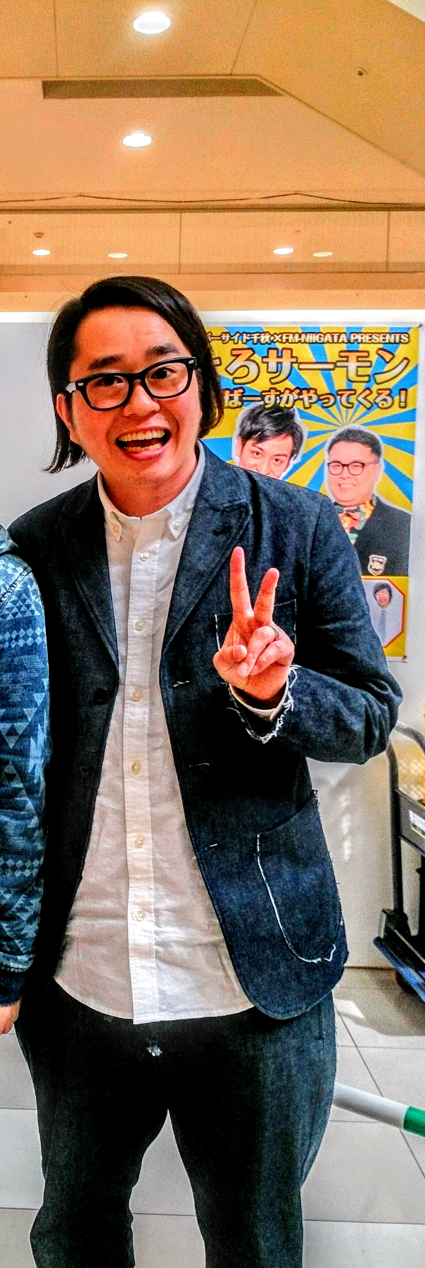 関田 将人